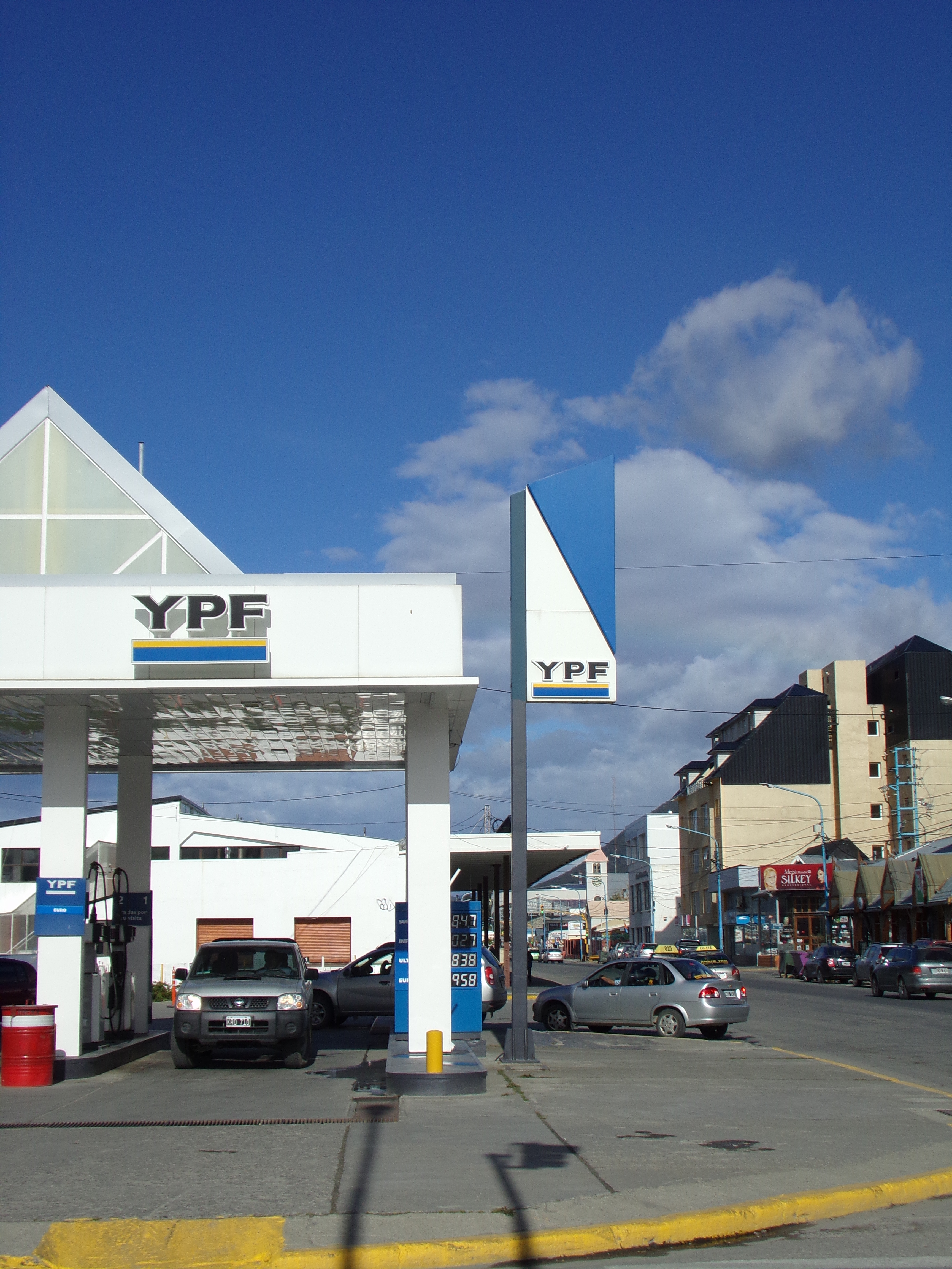 Estación YPF Ushuaia Centro